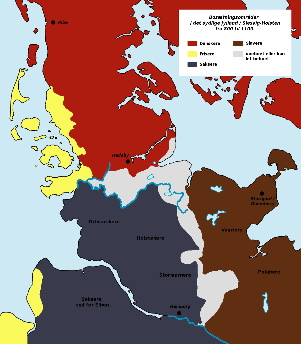 Bosætningsområder i det sydlige Jylland / Slesvig-Holsten fra omtrent 800 til 1100, kilder: 1) "Siedlungsgebiete vom 9. bis 11. Jahrhundert" i: Historischer Atlas Schleswig-Holstein vom Mittelalter bis 1867, Neumünster 2004. 2) Peter Ilsøe: Nordens Historie, København 1936 (med tekst)